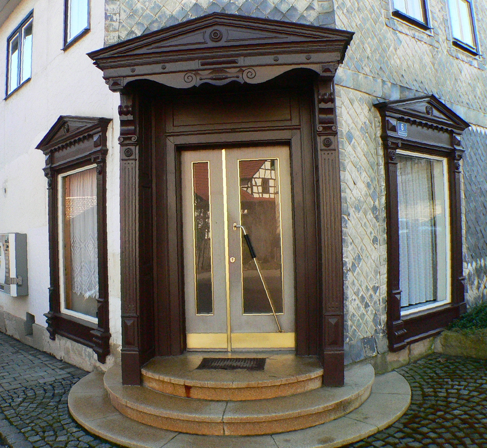 Gauerstadt, ehemaliger Dorfladen